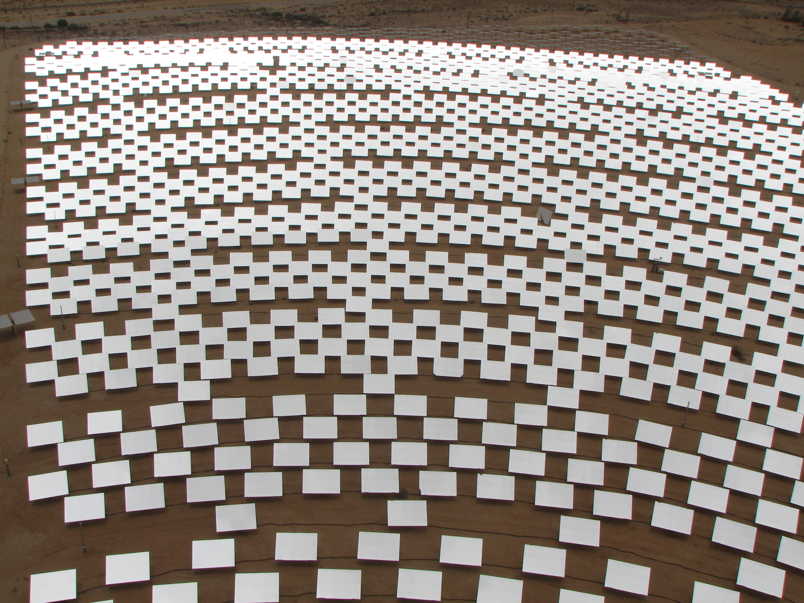 השדה הסולרי באתר SEDC בפארק התעשיות רותם - תמונה ממגדל השמש